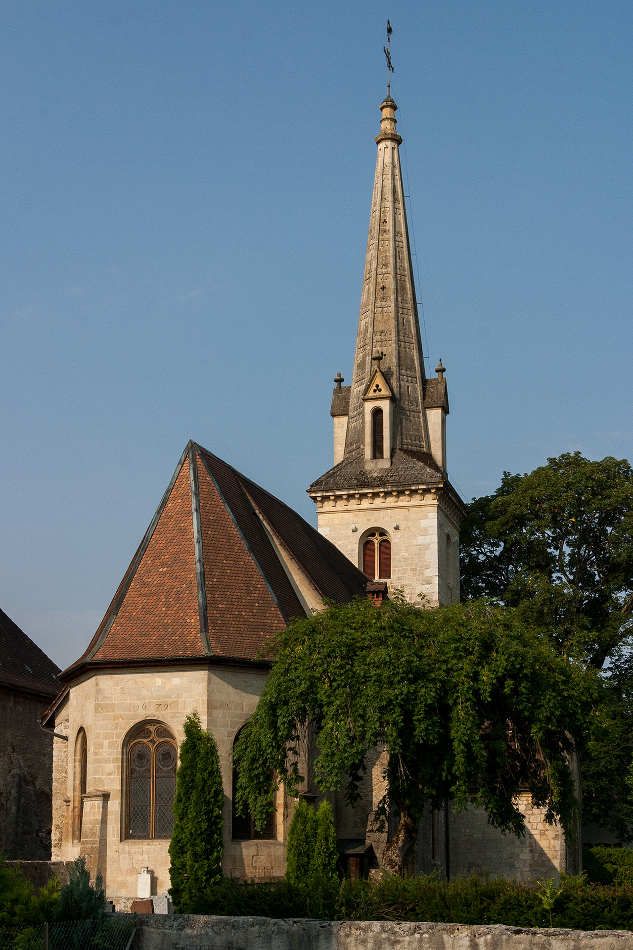 Kirche von Môtiers (NE)